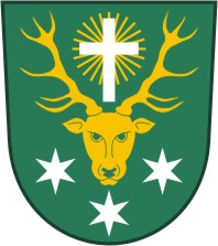 Drahouš